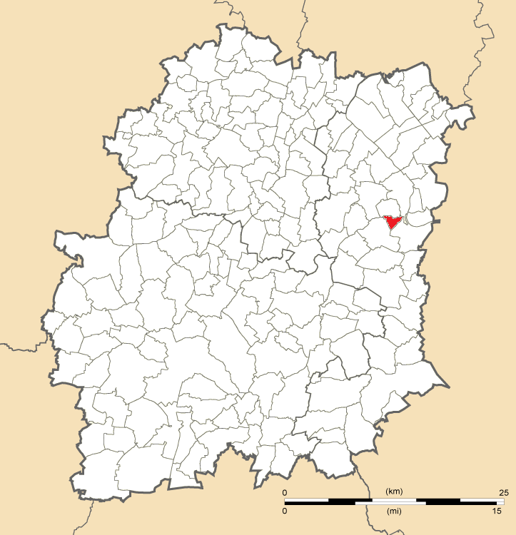 Carte de position d'Ormoy en Essonne (91)